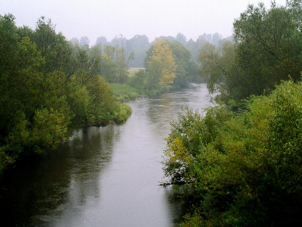 Pededze River near Litene, Latvia